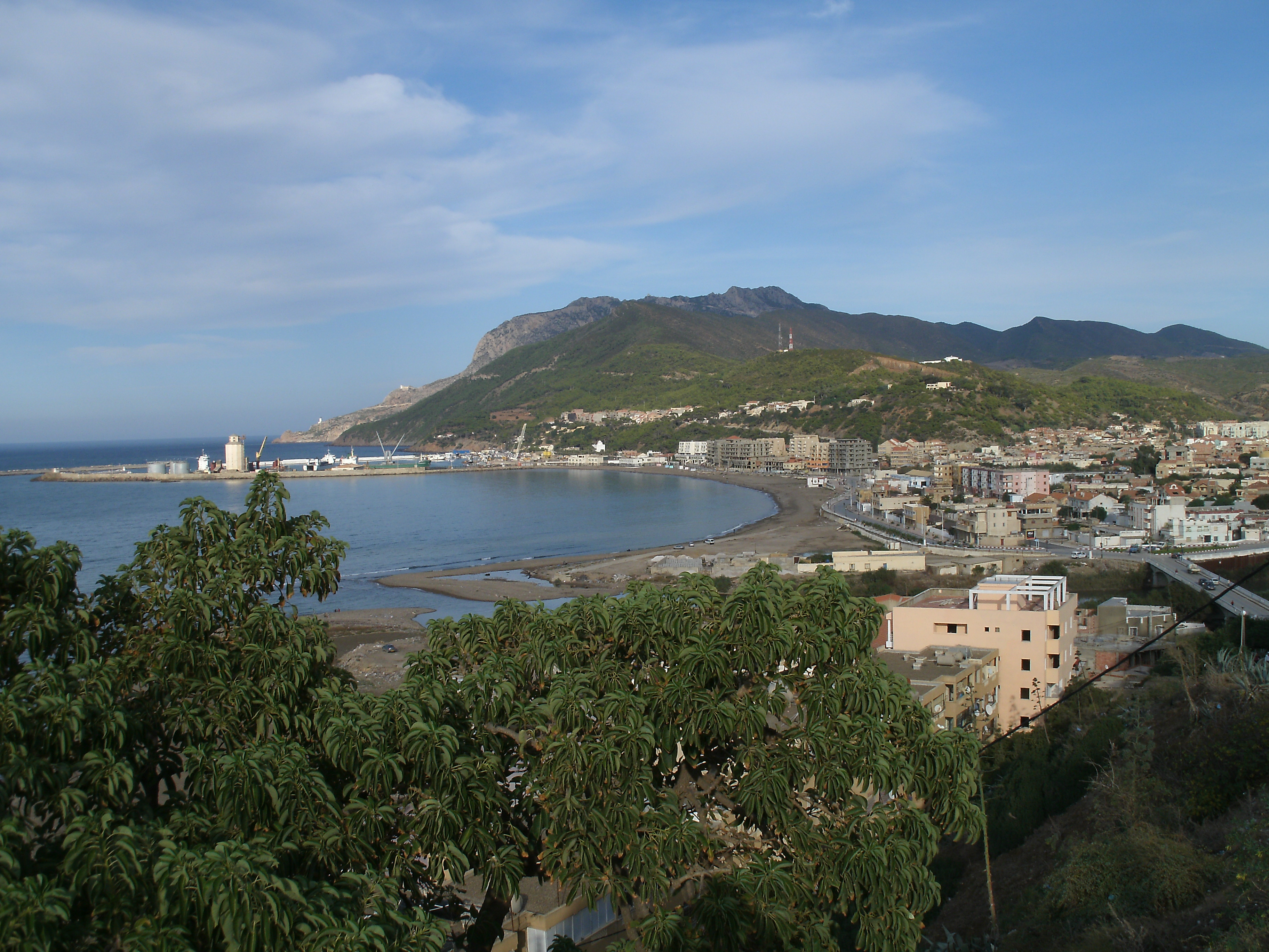 Ténès (Algerie